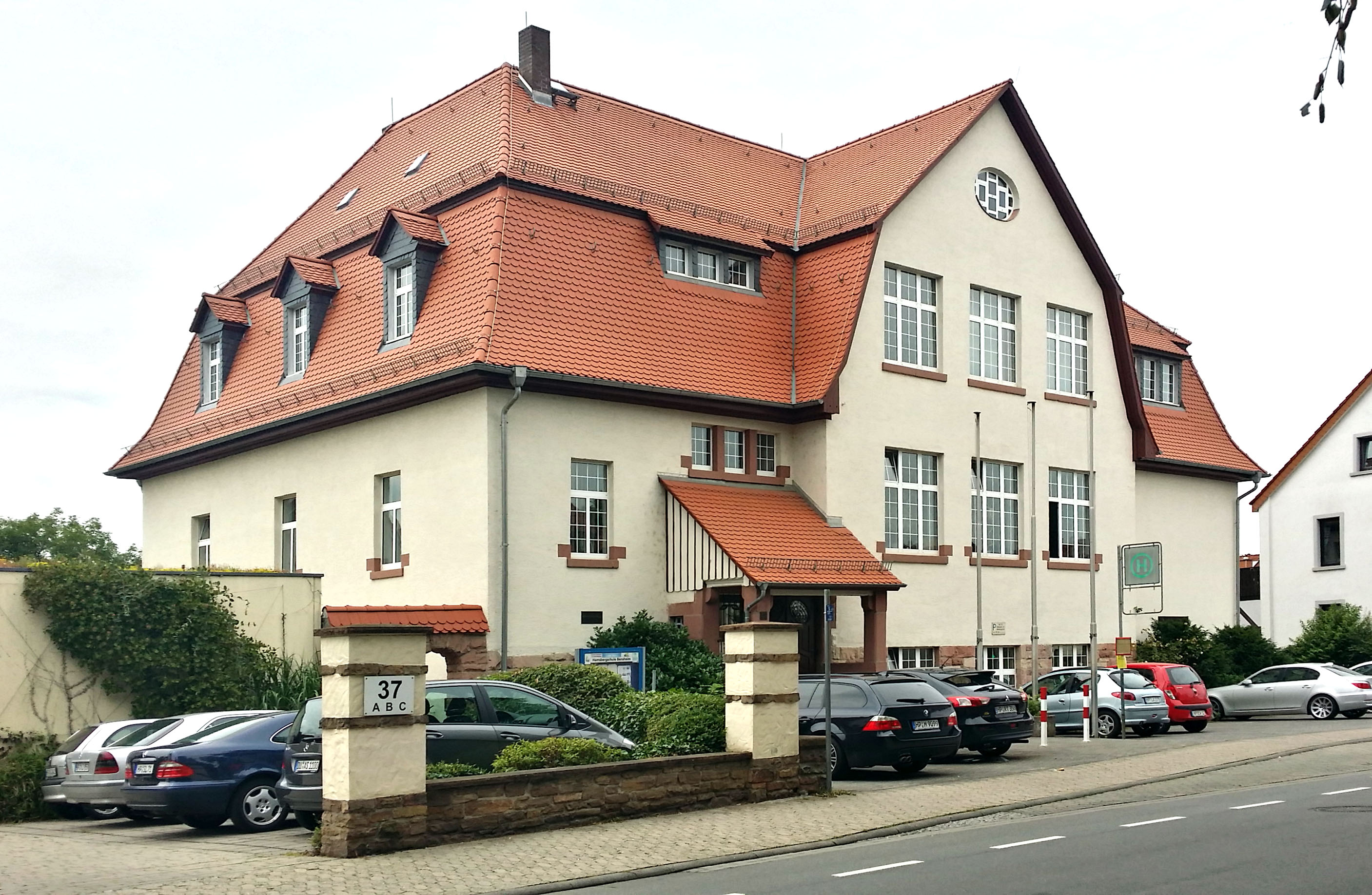 Berufsfortbildungsschule als Bau- und Gewerbe sowie Malerschule Gebäude wurde nach den Plänen des Hauptlehrers Hugo Eisenhardt an der Heidelberger Straße erbaut und am 11. August 1907 seiner Bestimmung übergeben.